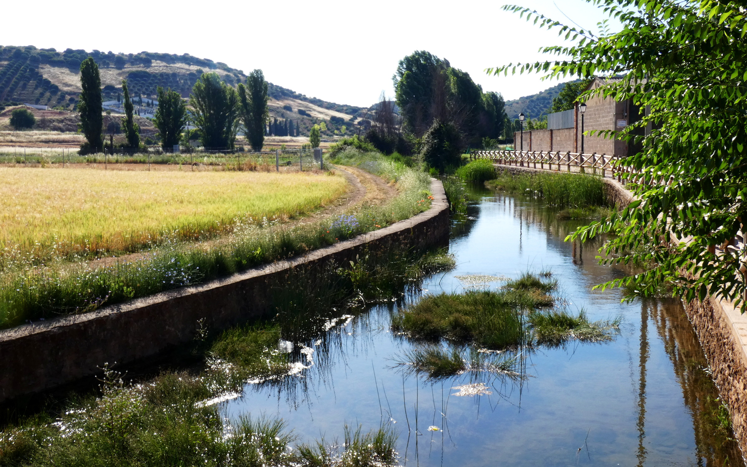 El pequeño río Cañamares de la cuenca del Guadiana, canalizado a su paso por Carrizosa (Ciudad Real).